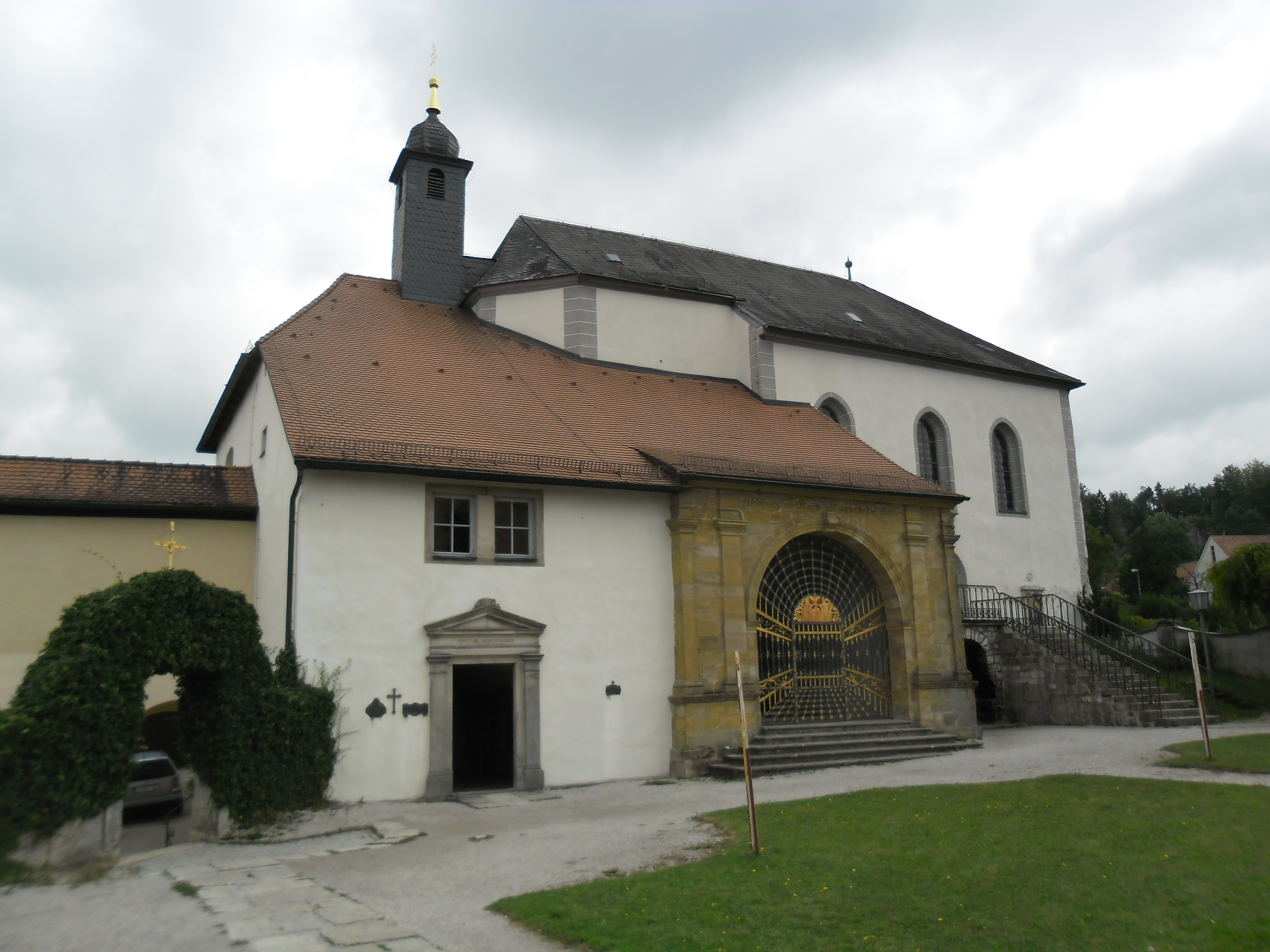 Die Klosterkirche mit begehbarer Mönchsgruft in Gößweinstein